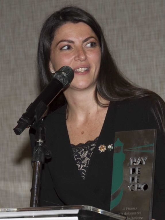 Olona recibió en la gala anual de este colectivo el galardón por su trabajo contra la corrupción y en defensa del Estado de Derecho en el País Vasco.